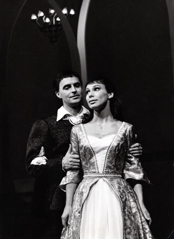 Rune Blomquist och Gurie Nordwall i Romeo och Julia på Helsingborgs stadsteater